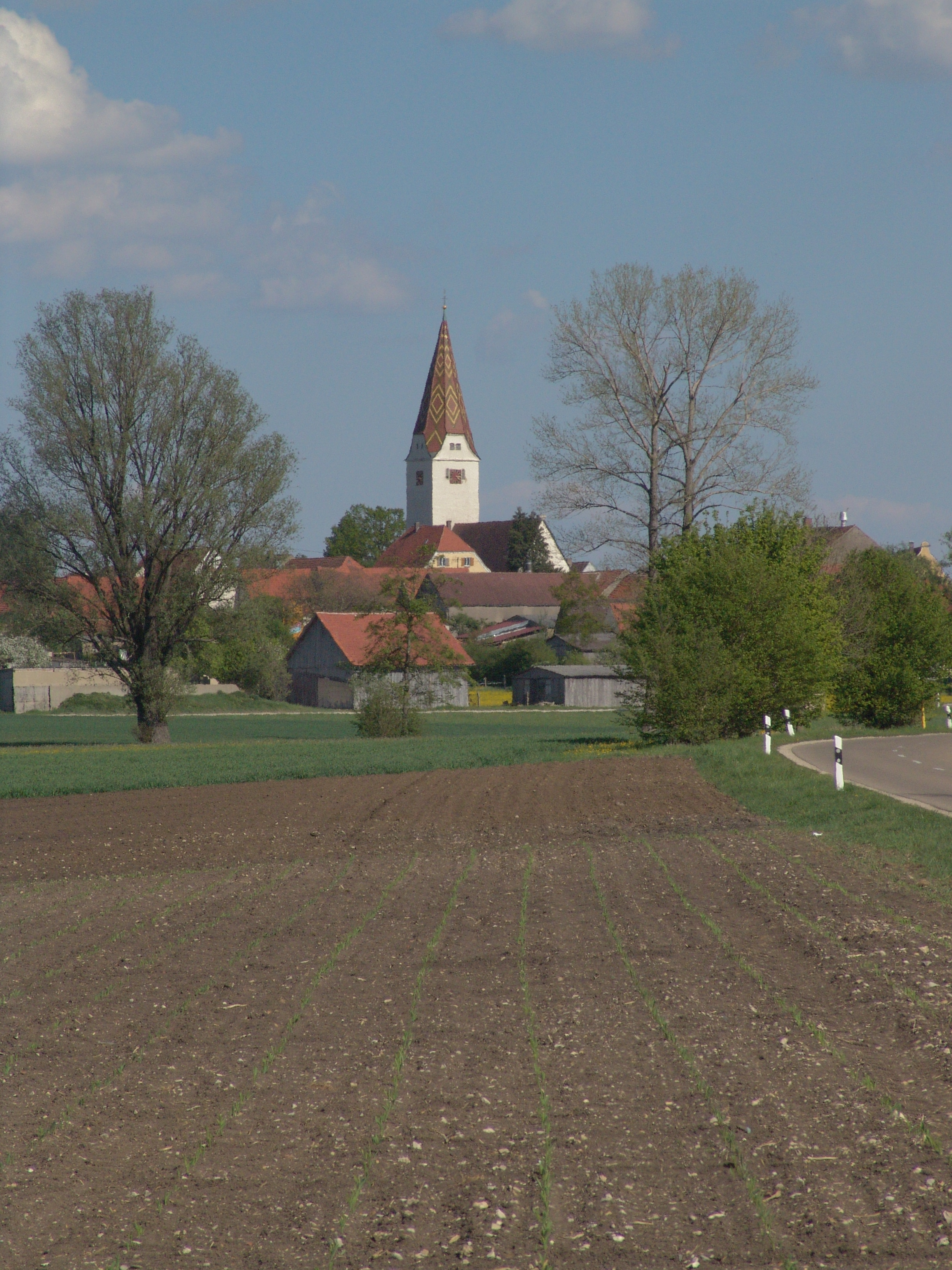 evang.-luth. Kirche St. Stephanus in Alerheim